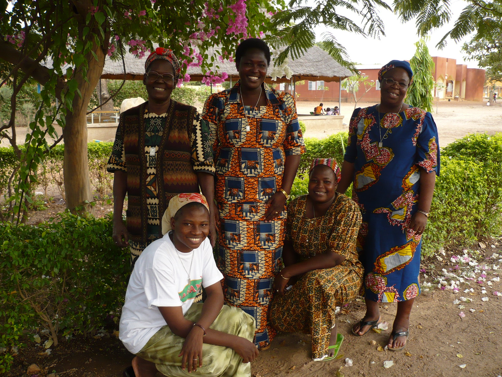 Une équipe de Travailleuses Missionnaires de l'Immaculée en mission à l'Orphelinat Sainte Thérèse de l'Enfant Jésus de Loumbila au Burkina Faso (décembre 2009)